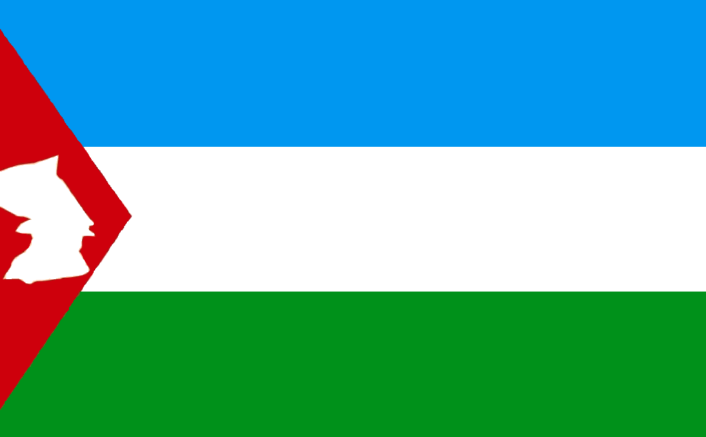 Bandera del municipio Los Guayos, estado Carabobo, Venezuela